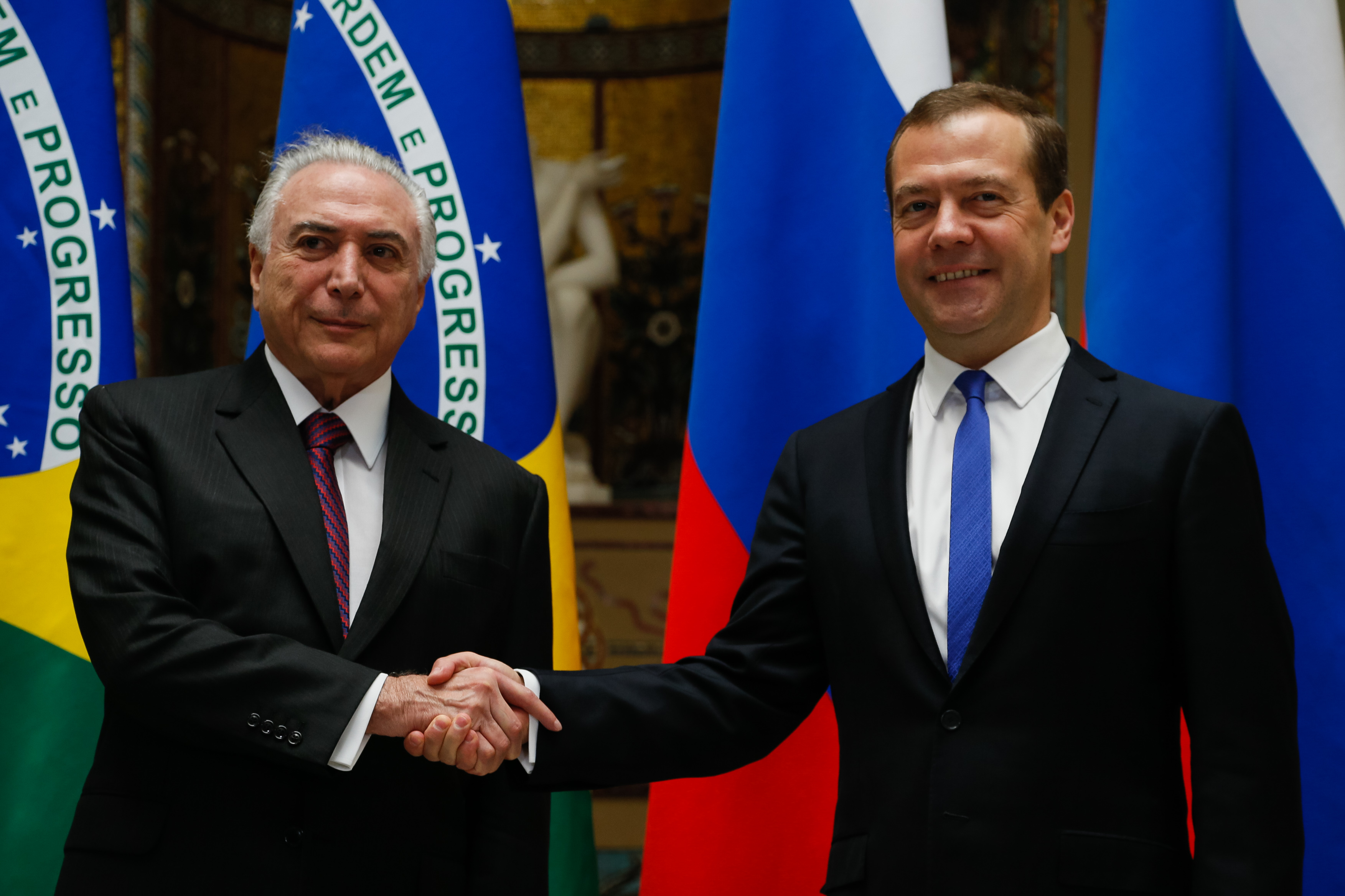 (Moscou - Rússia, 21/06/2017) Encontro com o senhor Dmitri Medvedev Presidente de Governo da Federação da Rússia.